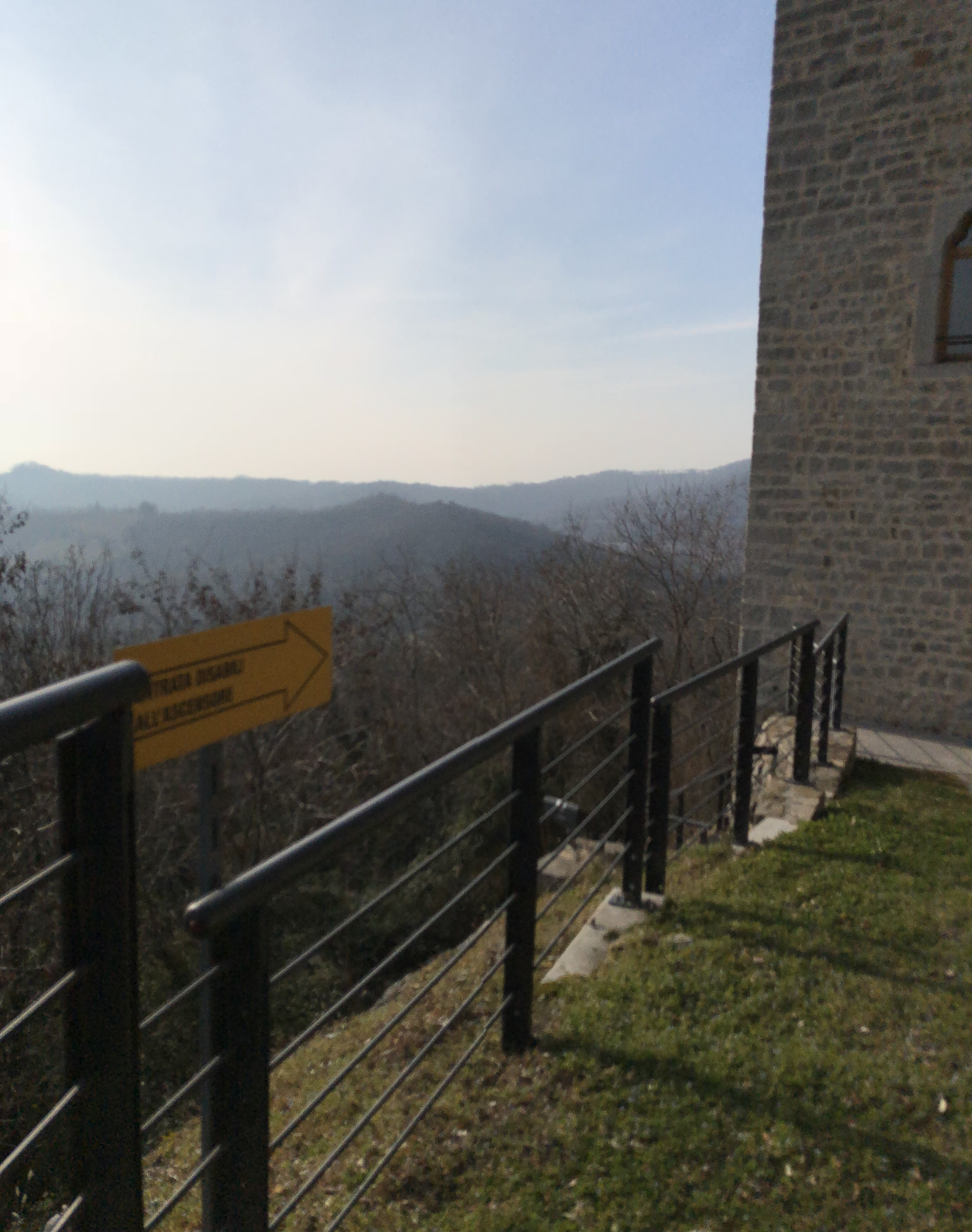 Castello Partistagno